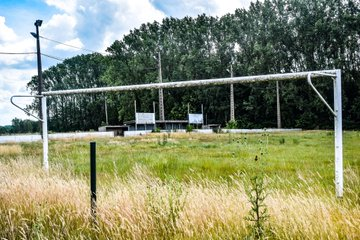 doel